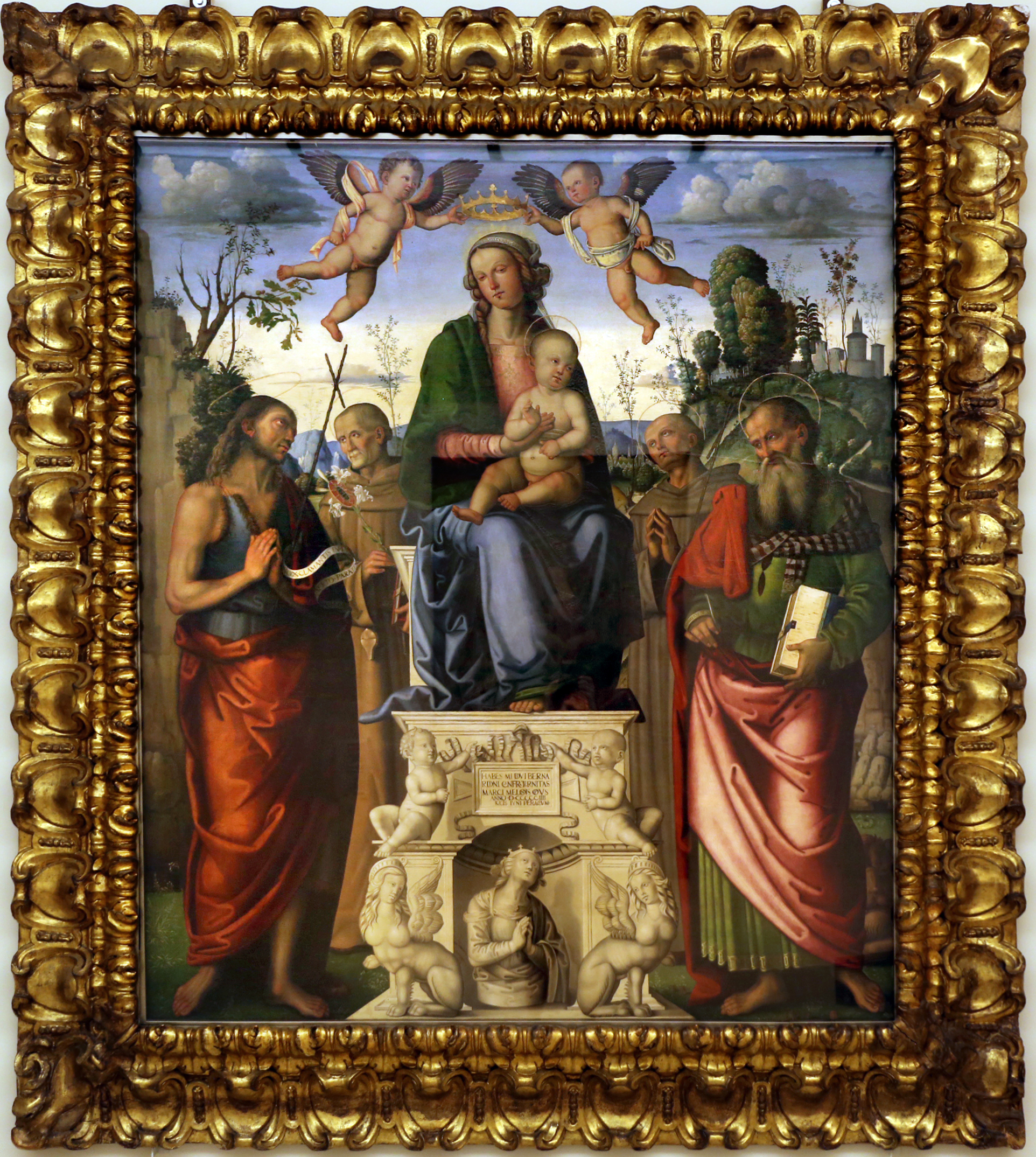 Palazzo dei Musei (Modena) This is a photo of a monument which is part of cultural heritage of Italy.